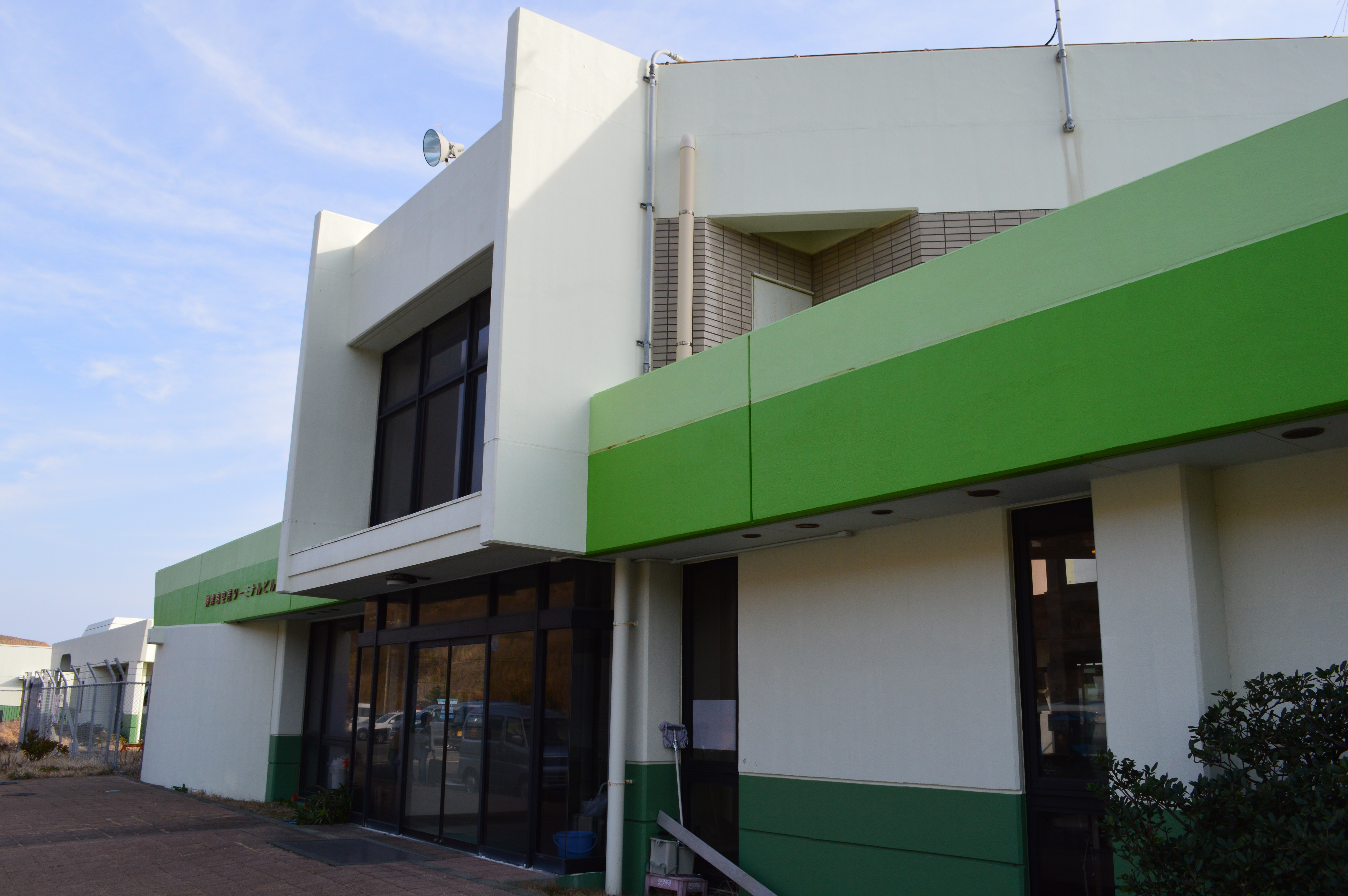 神津島飛行場 入り口